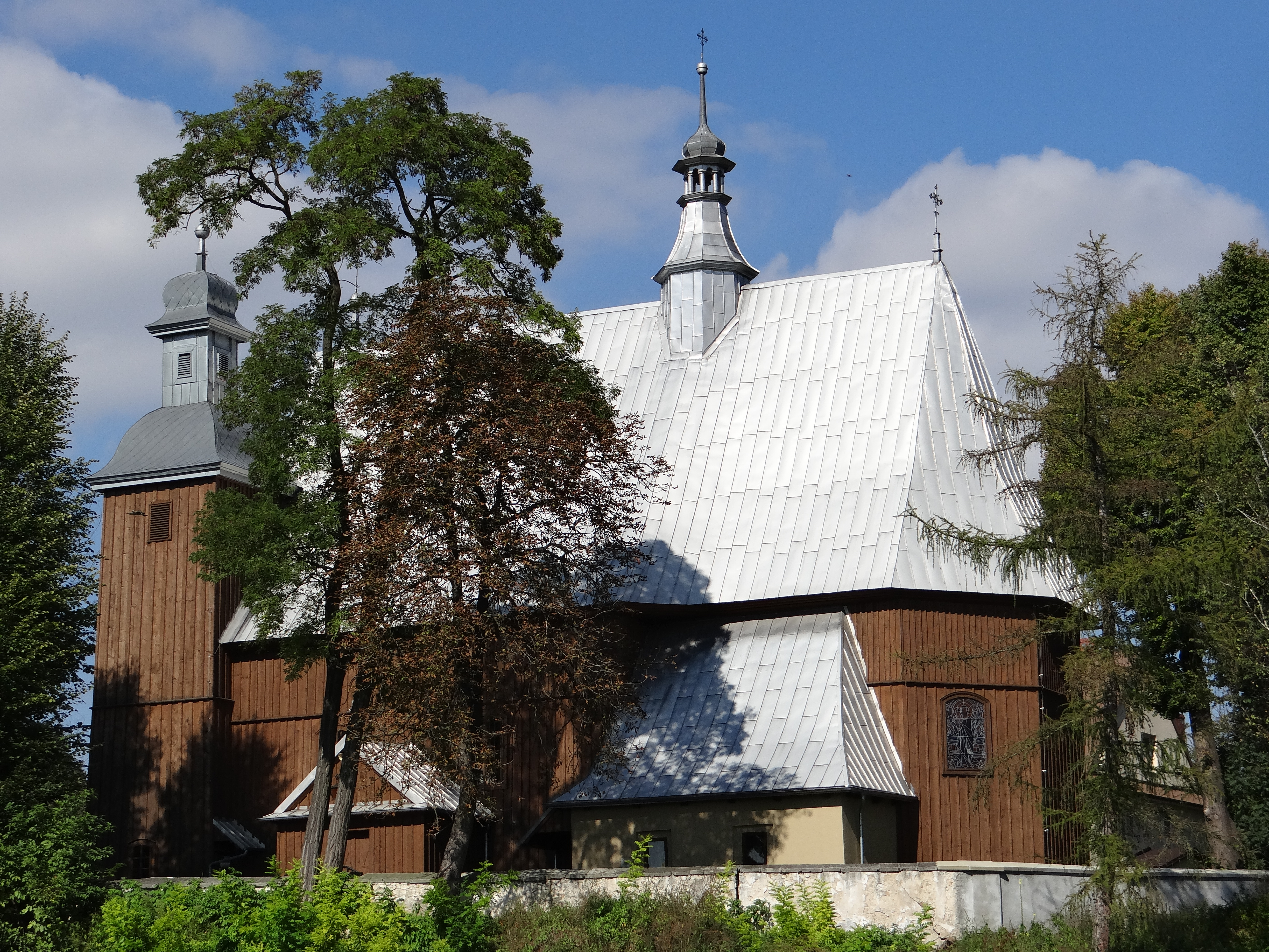 Iwanowice Włościańskie, kościół par. pw. Św. Trójcy, 1745